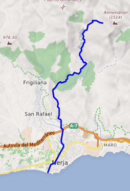 Cours d'eau surligné en bleu This map may be incomplete, and may contain errors. Don't rely solely on it for navigation.